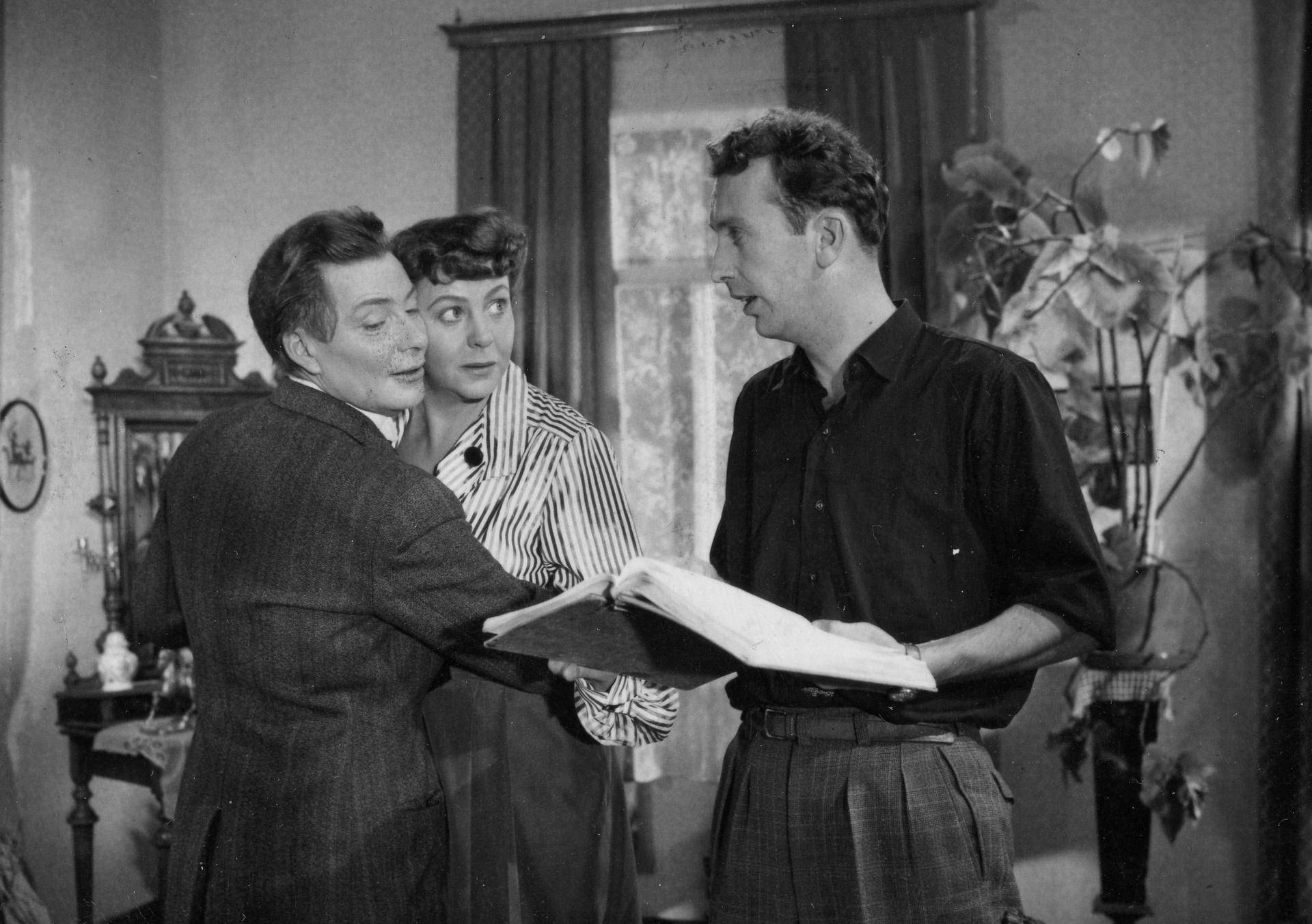 Matti Kassila (oik.) ohjaa Toivo Mäkelää ja Rauni Luomaa F. E. Sillanpään Elokuun elokuvasovituksessa.